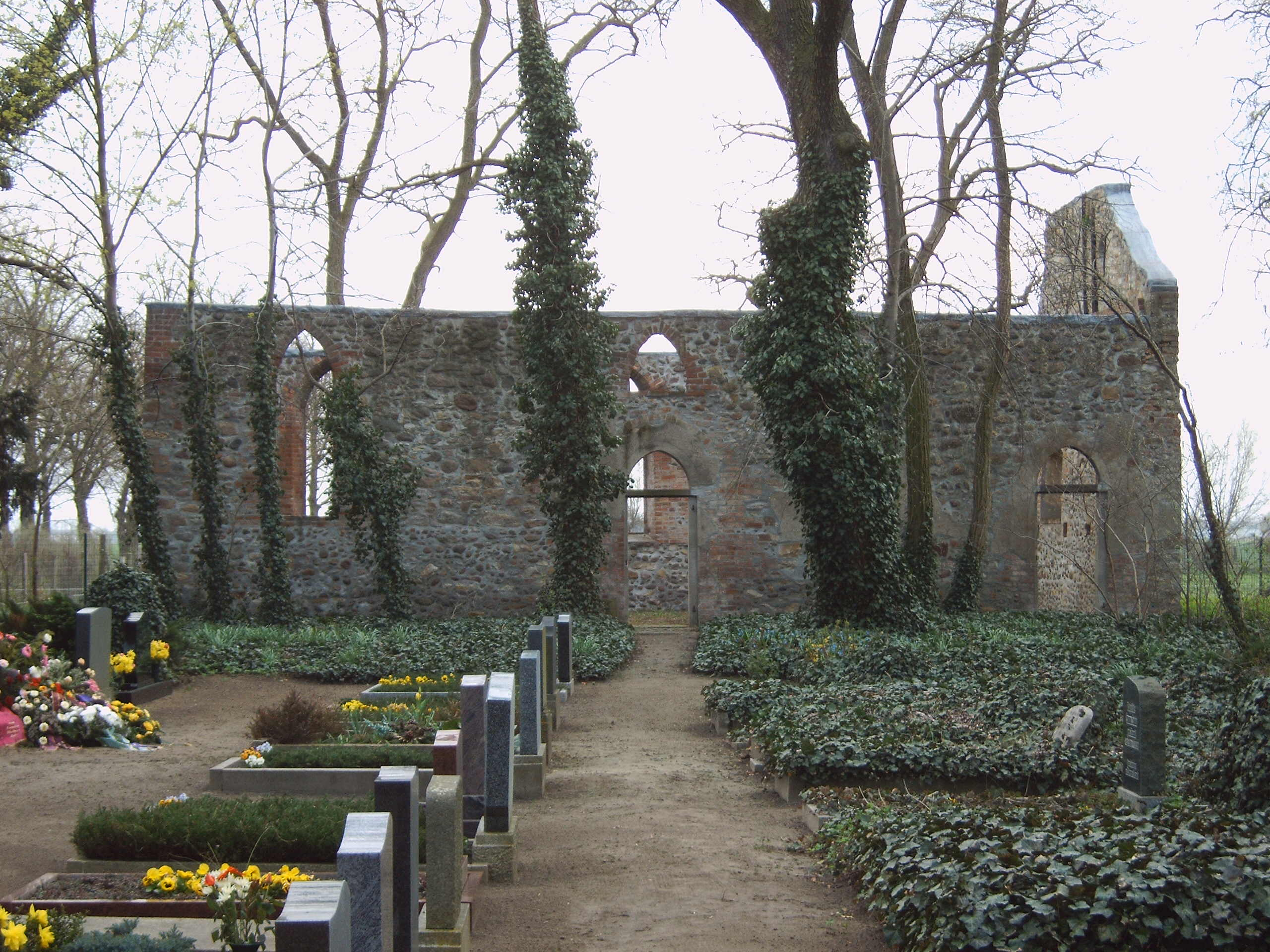 Ruine der Gutskapelle Pöthen, Pöthen, Gommern